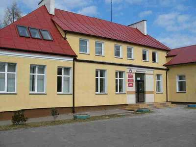 Budynek Zespołu Szkół w Nowej Krępie